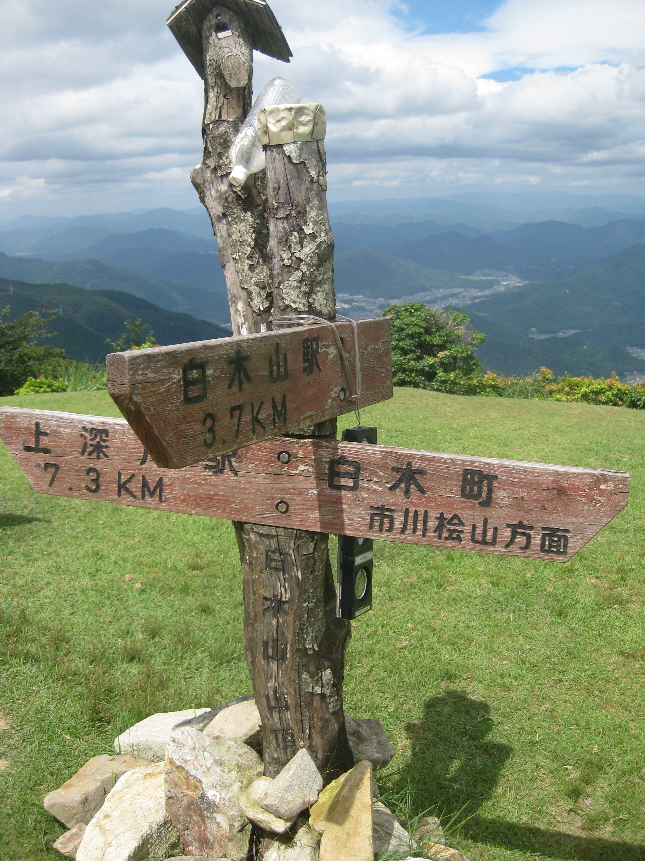 広島市安佐北区にある白木山の山頂標